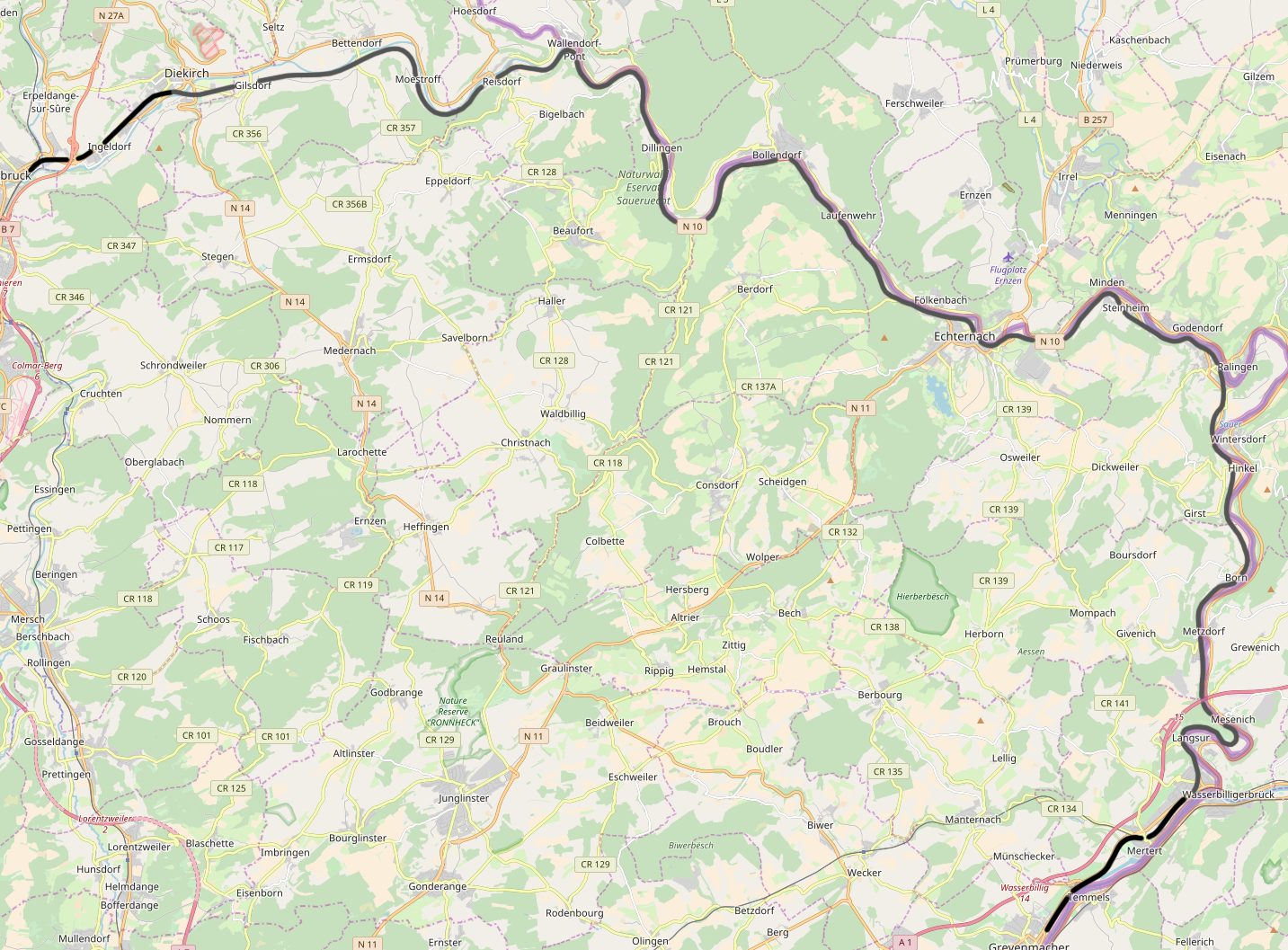 CFL line 1a, Ettelbruck - Grevenmacher